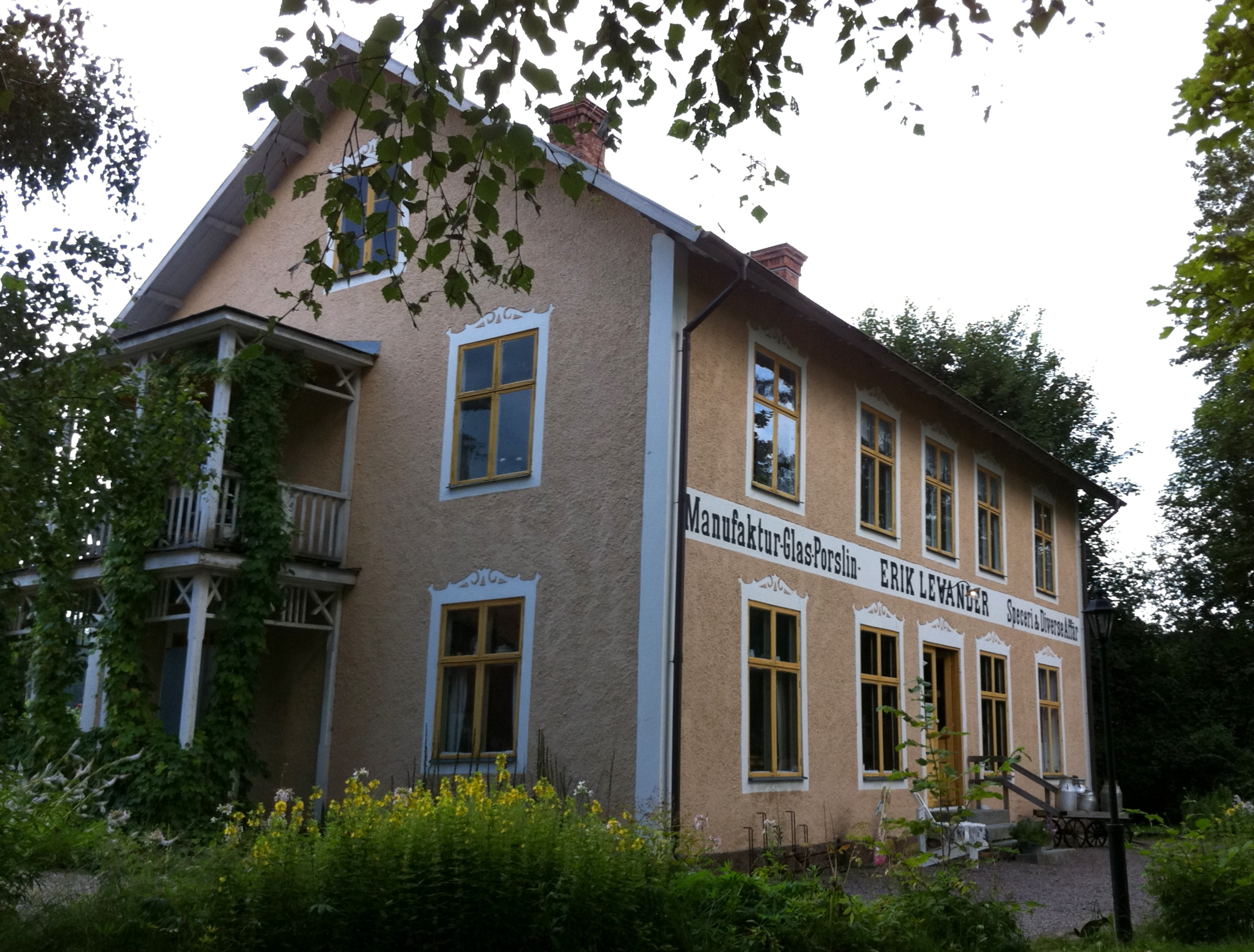 Levanders Lanthandel, Alseda, Vetlanda kommun